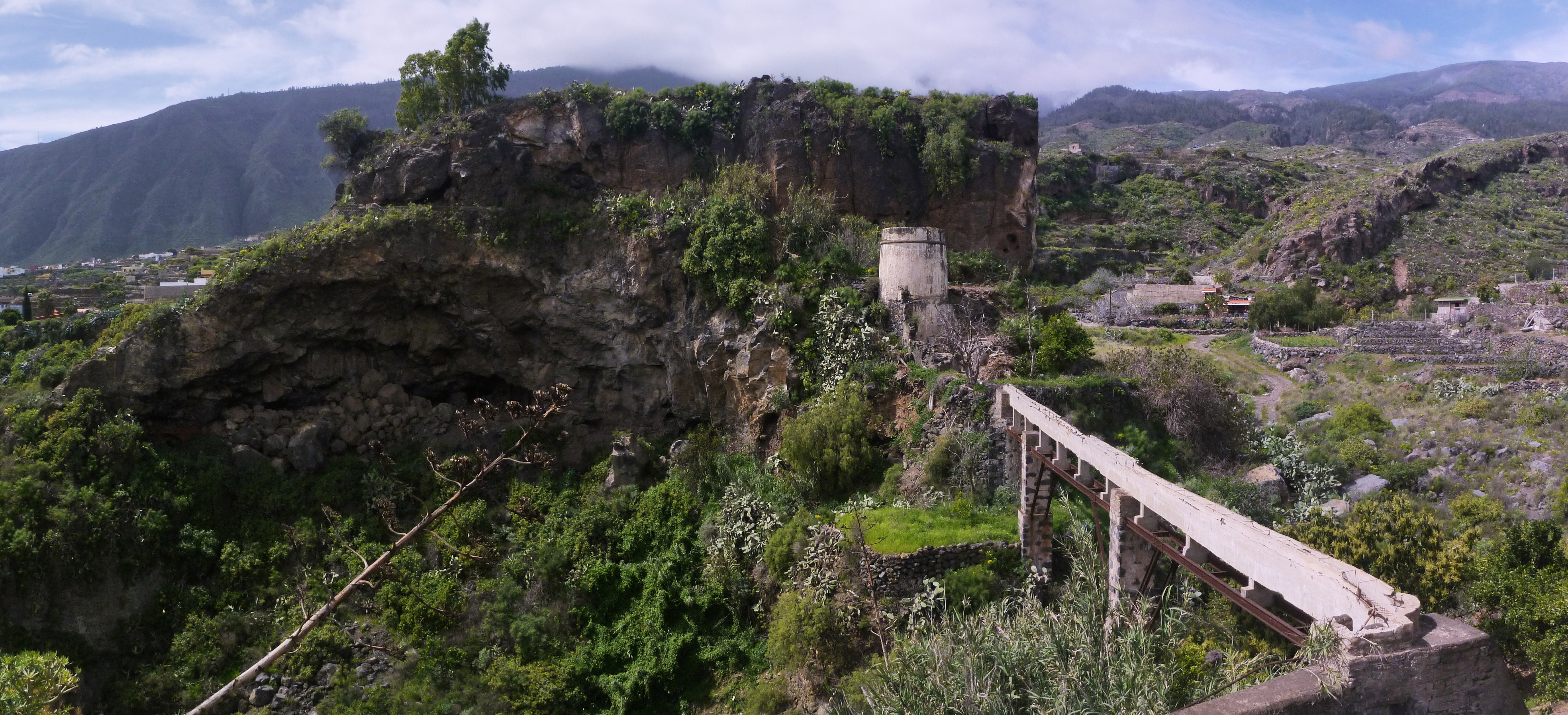 Molino de la Menora y Riscos del Uchón en el Barranco Chiñico, Barrio de la Raya, Güímar, Tenerife.